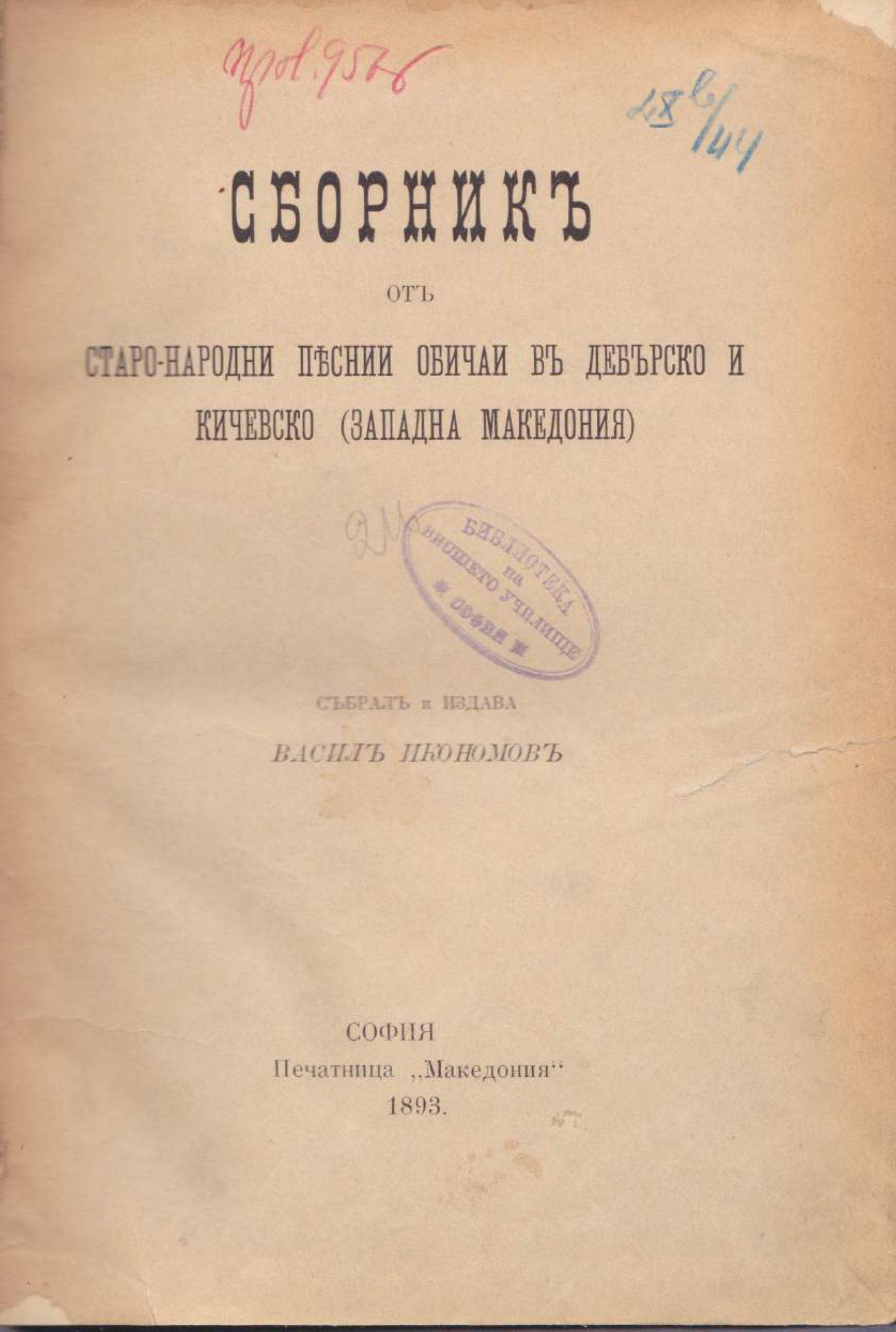 Корица на "Сборник от старо - народни умотворения из Дебърско, Кичевско и Охридско", Солун, 1895 г.